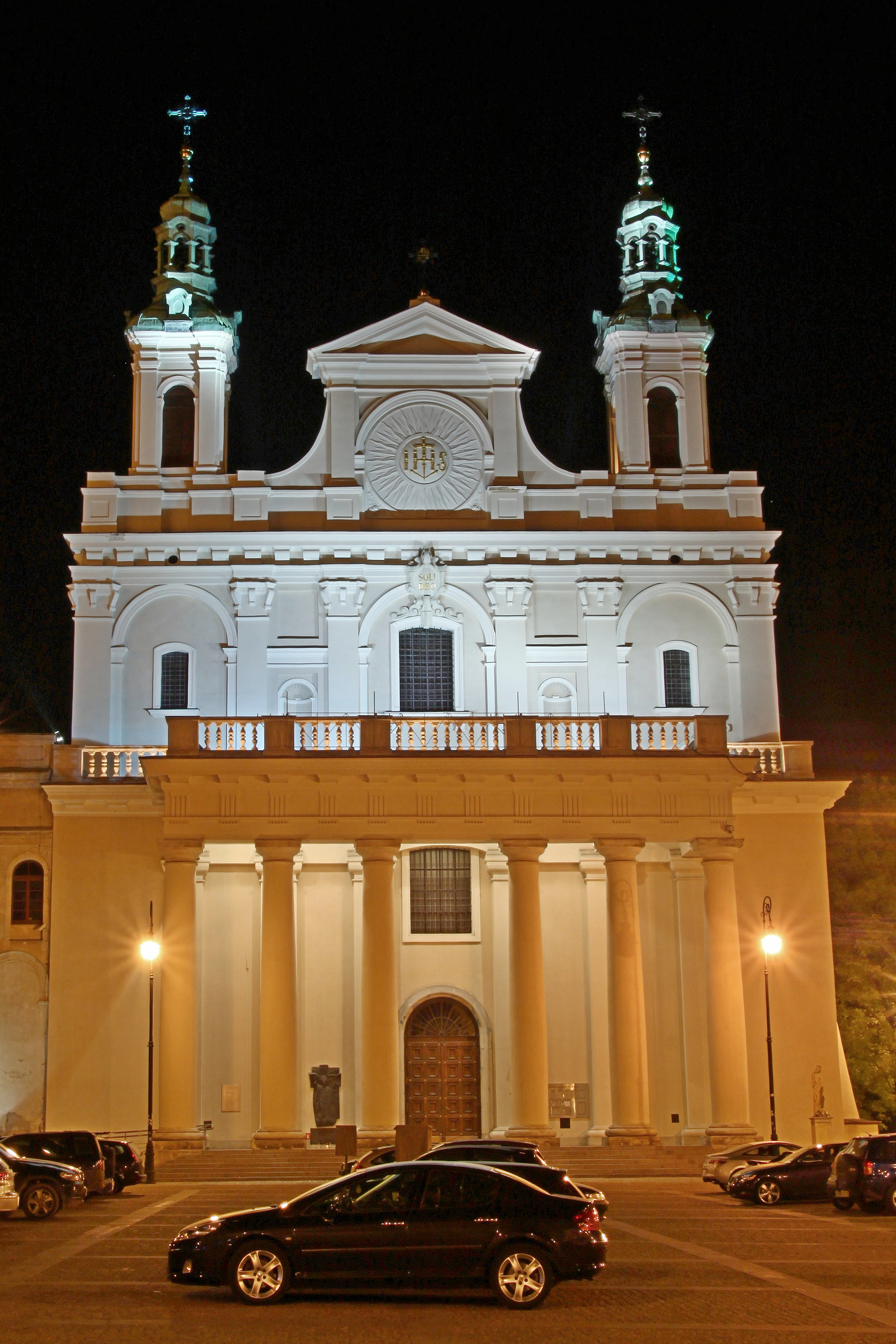 Lublin, kościół p.w. św. Jana, ob. katedra, XVI/XVII, XVIII/XIX